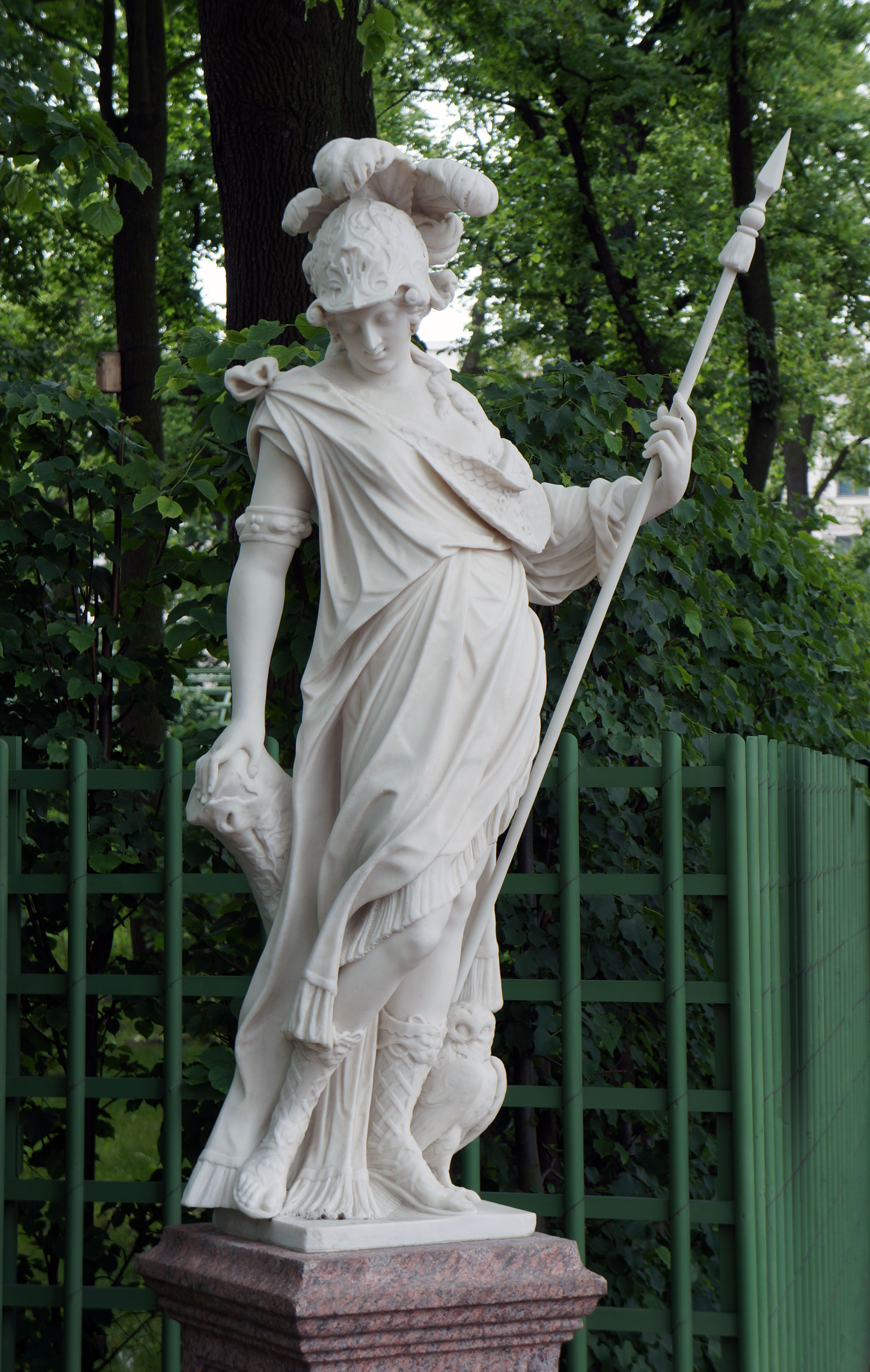 Летний сад Статуя Минерва. После реставрации. Фото 2012 года